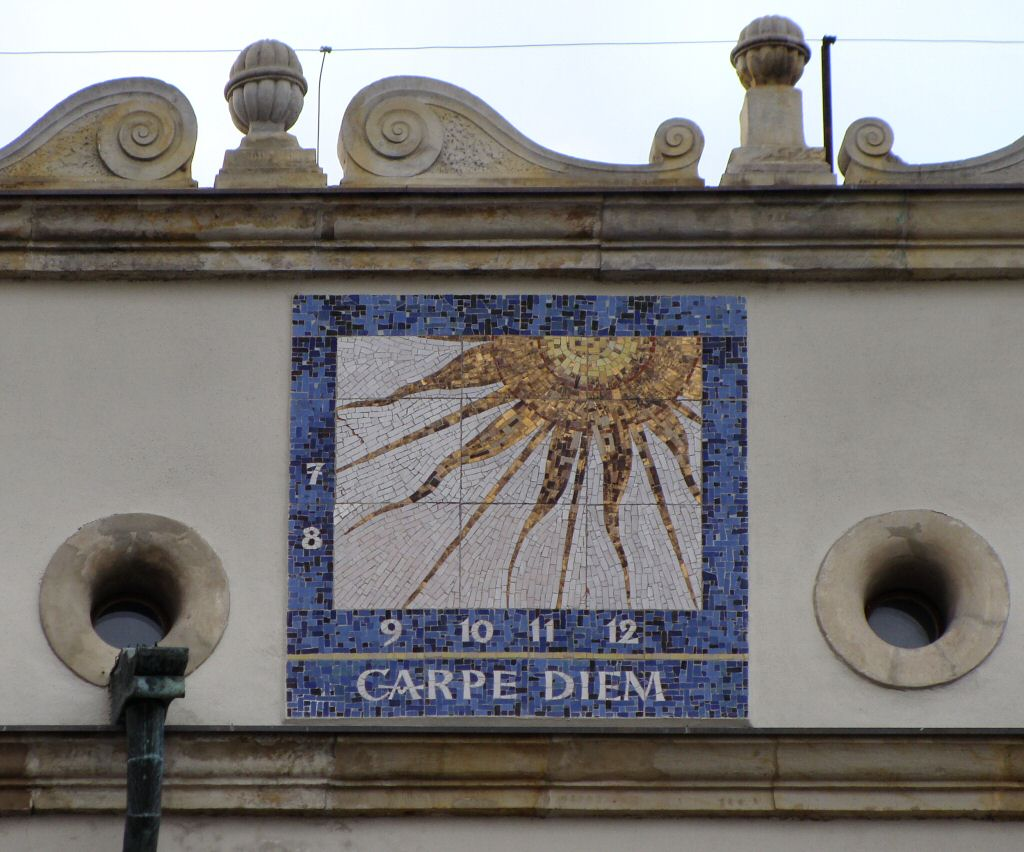 Zegar słoneczny - Zamek Książąt Pomorskich w Szczecinie